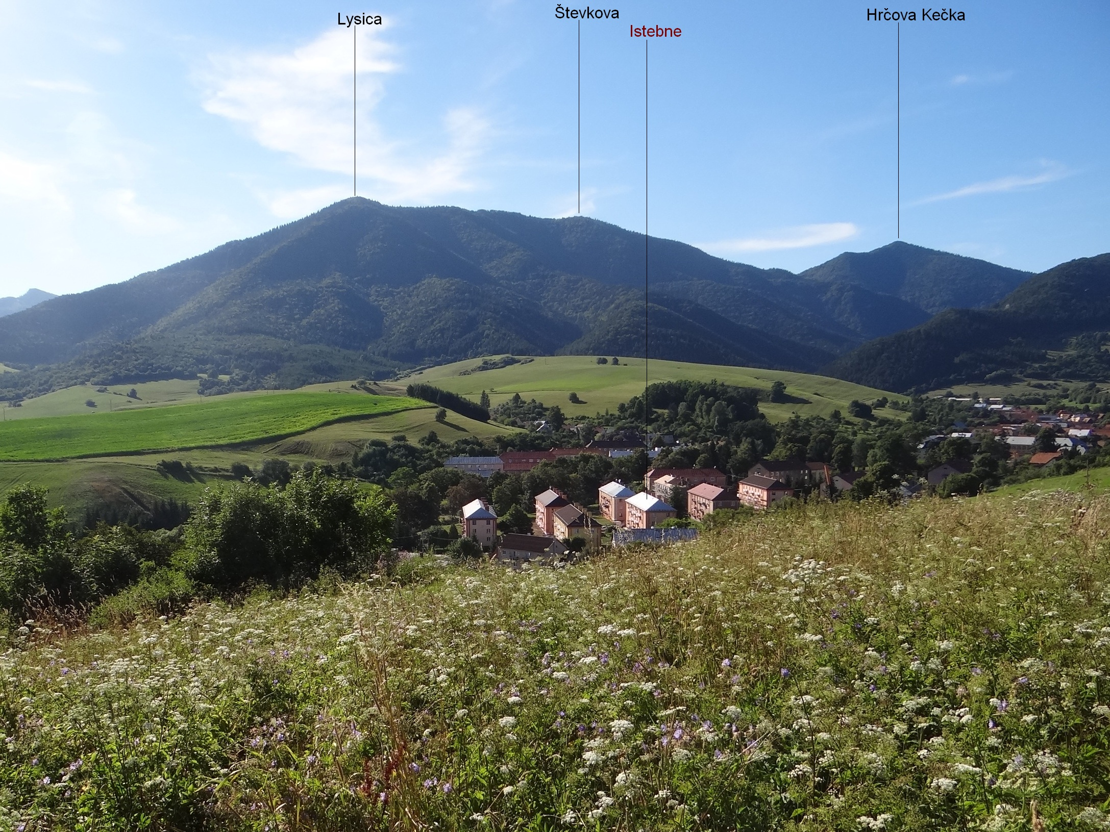 View from Istebne